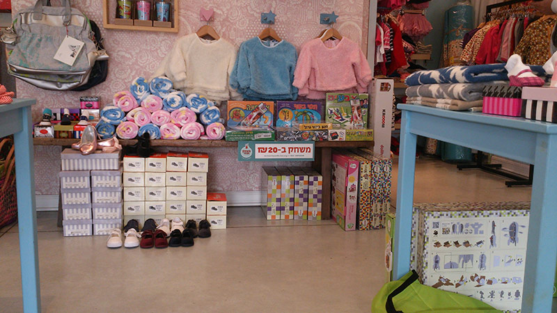 משחק חוזר